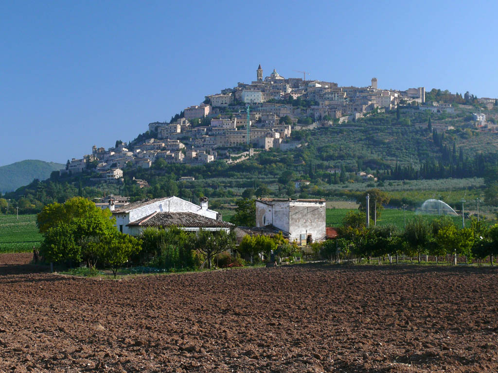 Trevi, view